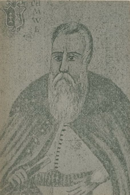 Беларуская (тарашкевіца): Партрэт Аляксандра Хадкевіча (Alaksandar Chadkievič)